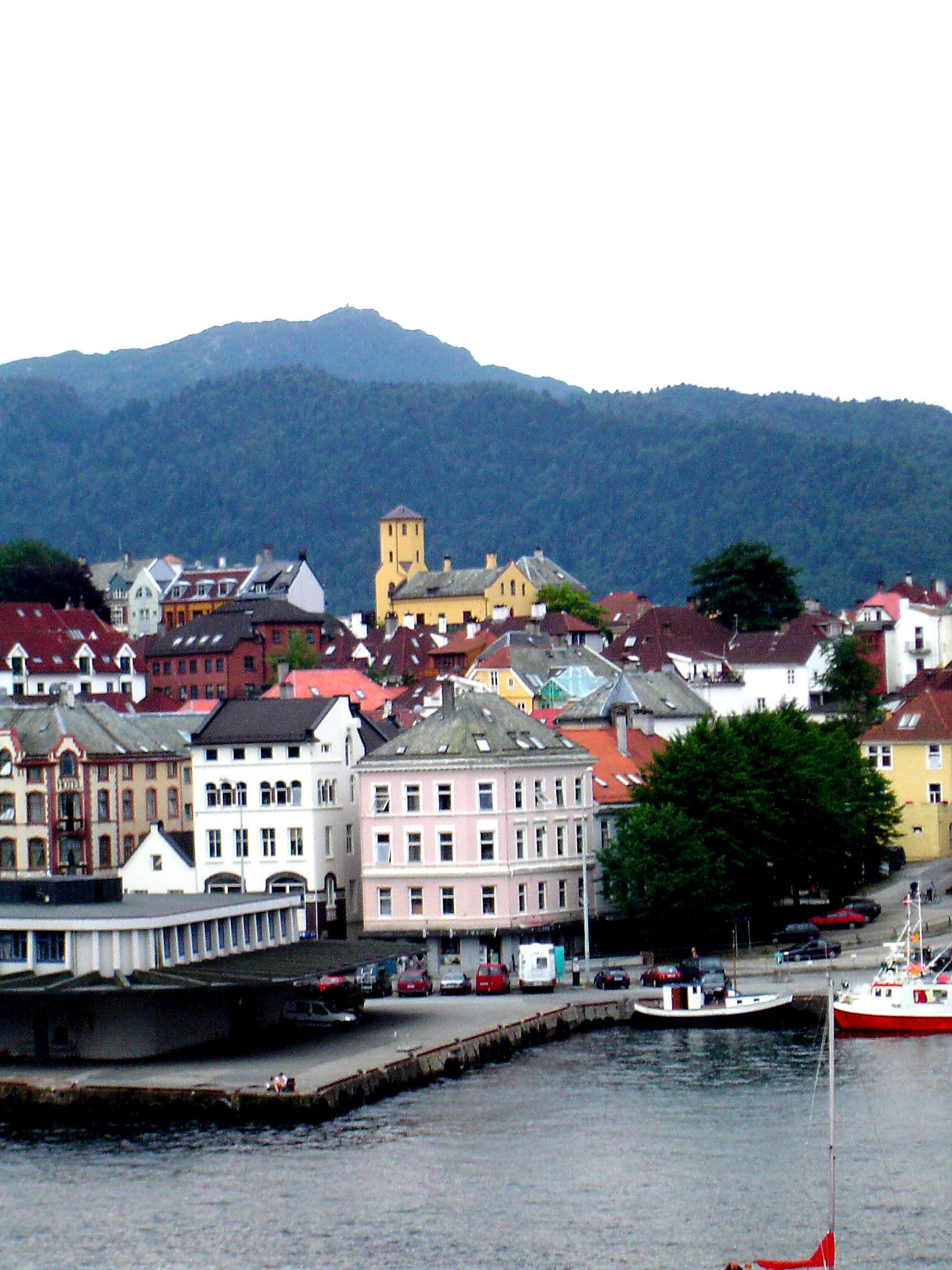 Hansevéierel zu Bergen